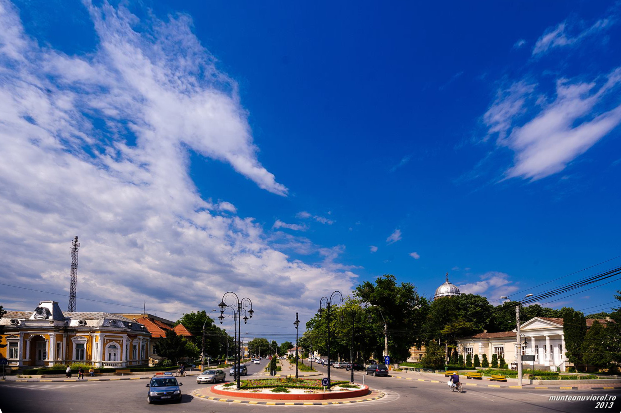 centrul municipiului Tecuci